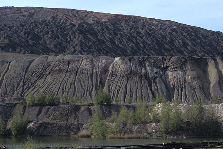 100 meter hög slagghög. Bilden troligen från mitten av 1970-talet.